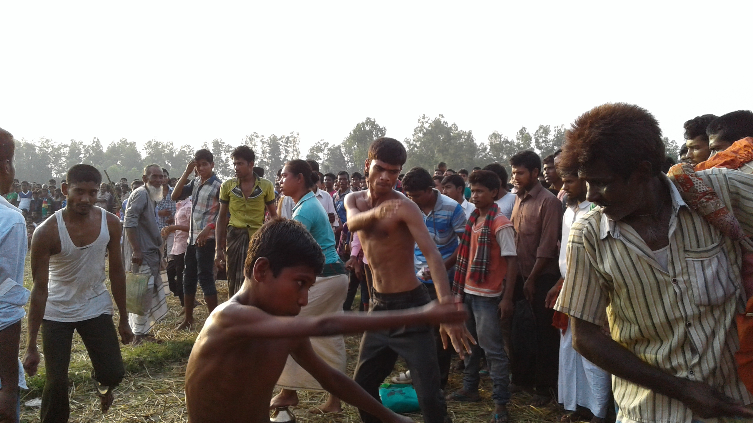 তিন পাগলের মেলা নামে পরিচিত এই মেলাটি বগুড়ার দুপচাঁচিয়া উপজেলার ঝাঁজিড়া গ্রামে বসে।